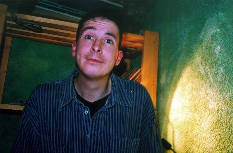 Volker Strübing im April 2001 in der Tagung (Berlin-Friedrichshain) bei der Lesebühne Chaussee der Enthusiasten